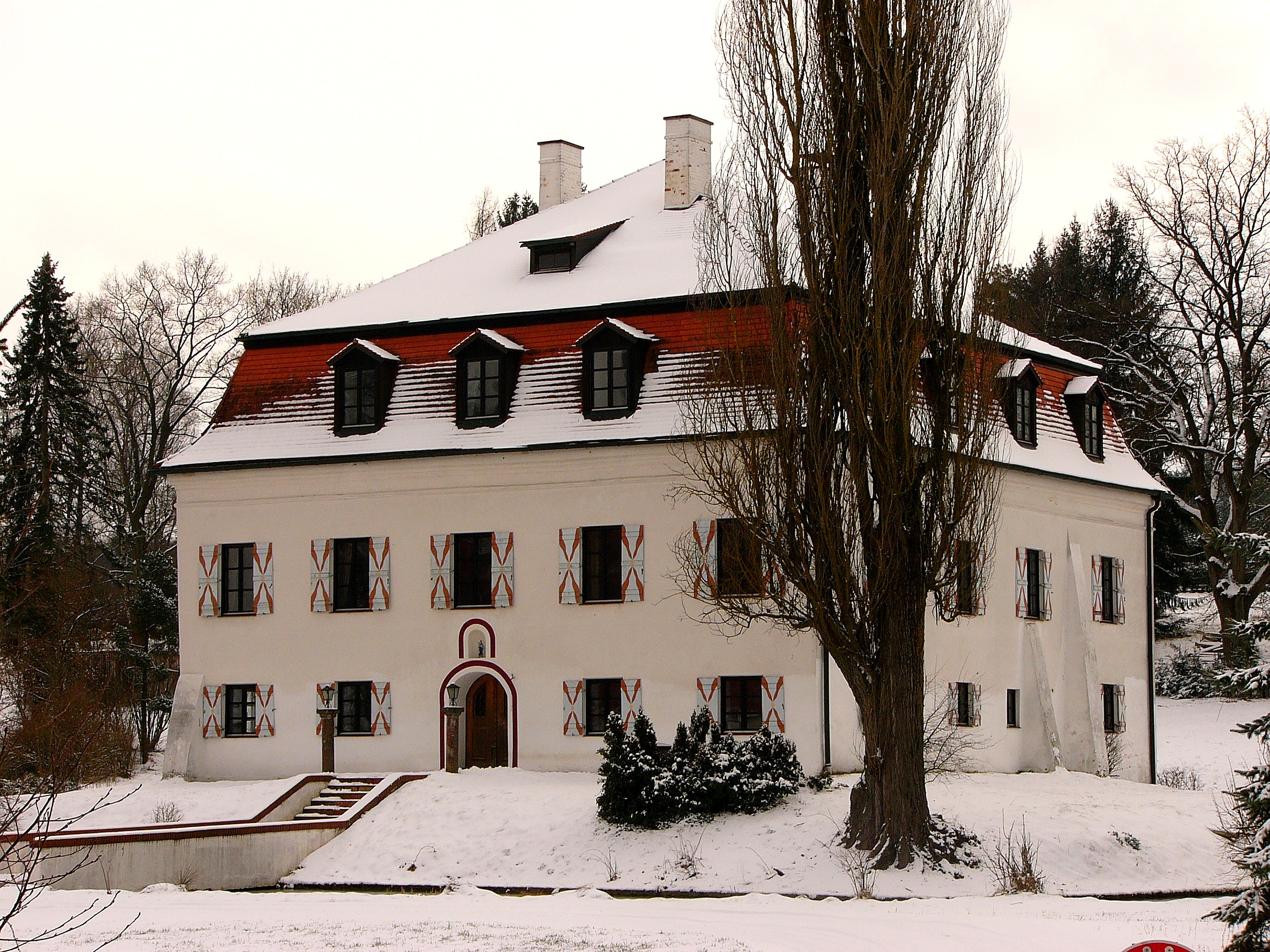 Schlossanlage; im 17. Jahrhundert von Georg Karl Freiherr von Enzdorf an Stelle eines älteren Schlosses erbaut; Wohngebäude, zweigeschossiger Mansardwalmdachbau, im Kern 17. Jahrhundert, im 18. Jahrhundert und später überformt, von einem Graben umgeben; Nord- und Ostflügel der Stall- und Wirtschaftsgebäude mit Durchfahrt und hohen Satteldächern, Nordflügel im 18. Jahrhundert erweitert; östlich Allee mit zwei Torpavillons, 1950; Schlossbräukeller, 17./18. Jahrhundert.This is a photograph of an architectural monument.